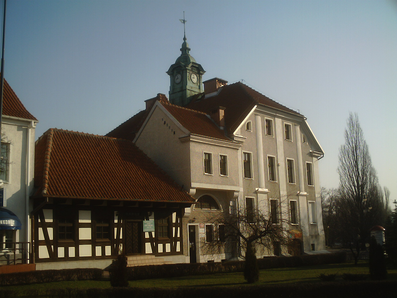 Zdjęcie przedstawia ratusz w Mrągowie od strony południowej. Autor zdjęcia B.N.